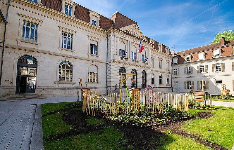 La mairie de Vesoul